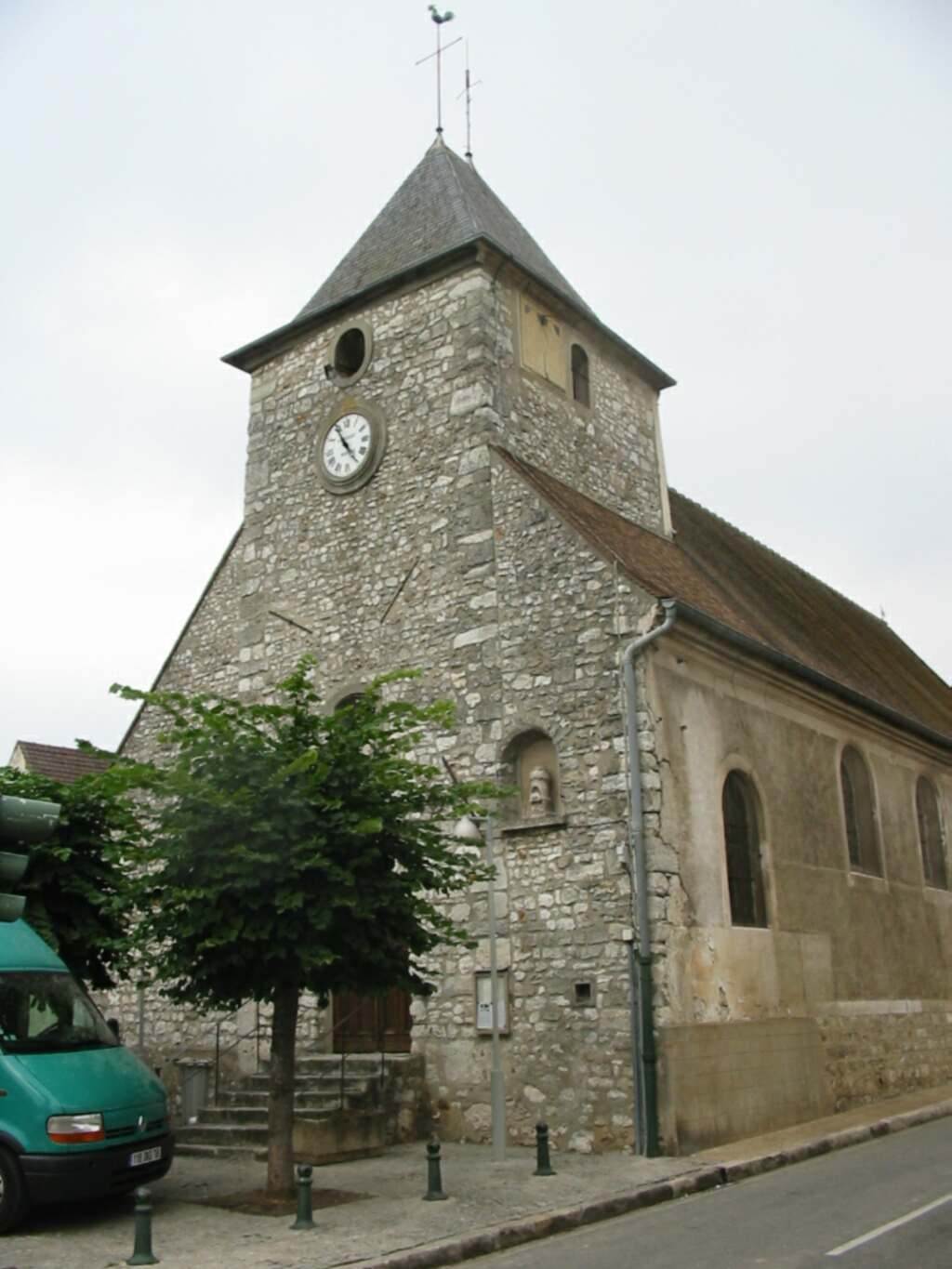 Eglise de Vert (Yvelines) Photo JH Mora, août 2005 Catégorie:Image de Vert (Yvelines) Vert